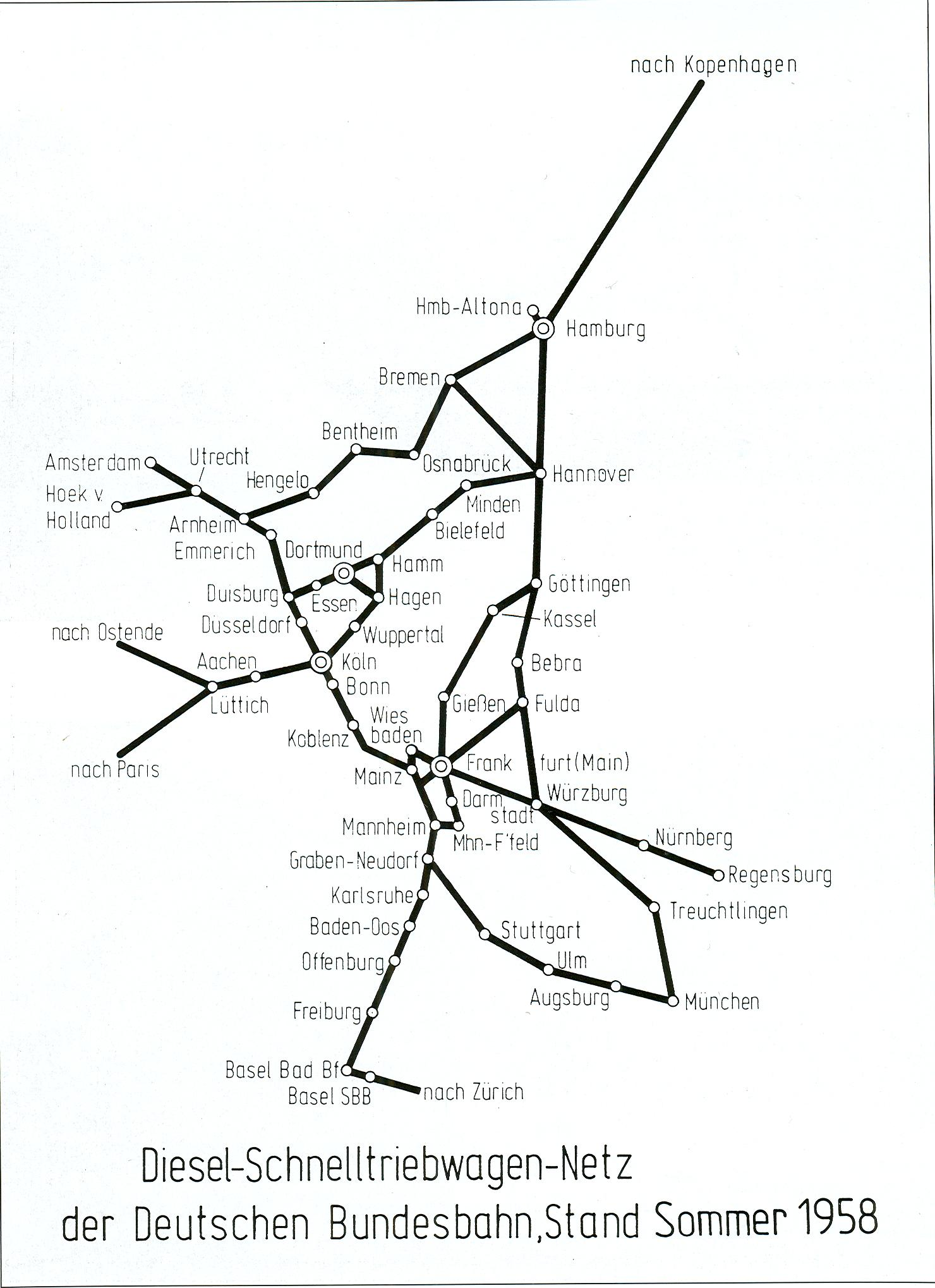 Streckennetz der durch Schnelltriebwagen bei der DB befahrenen Strecken